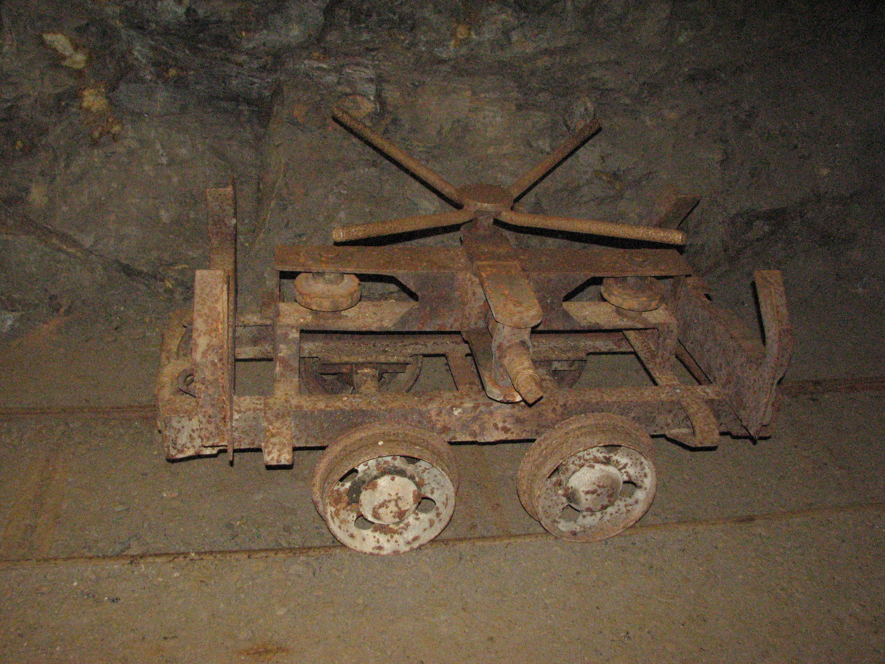 Ein Schienenbiegewagen (Schienenbiegelore) aus dem Bergwerk Schauinsland bei Freiburg im Breisgau